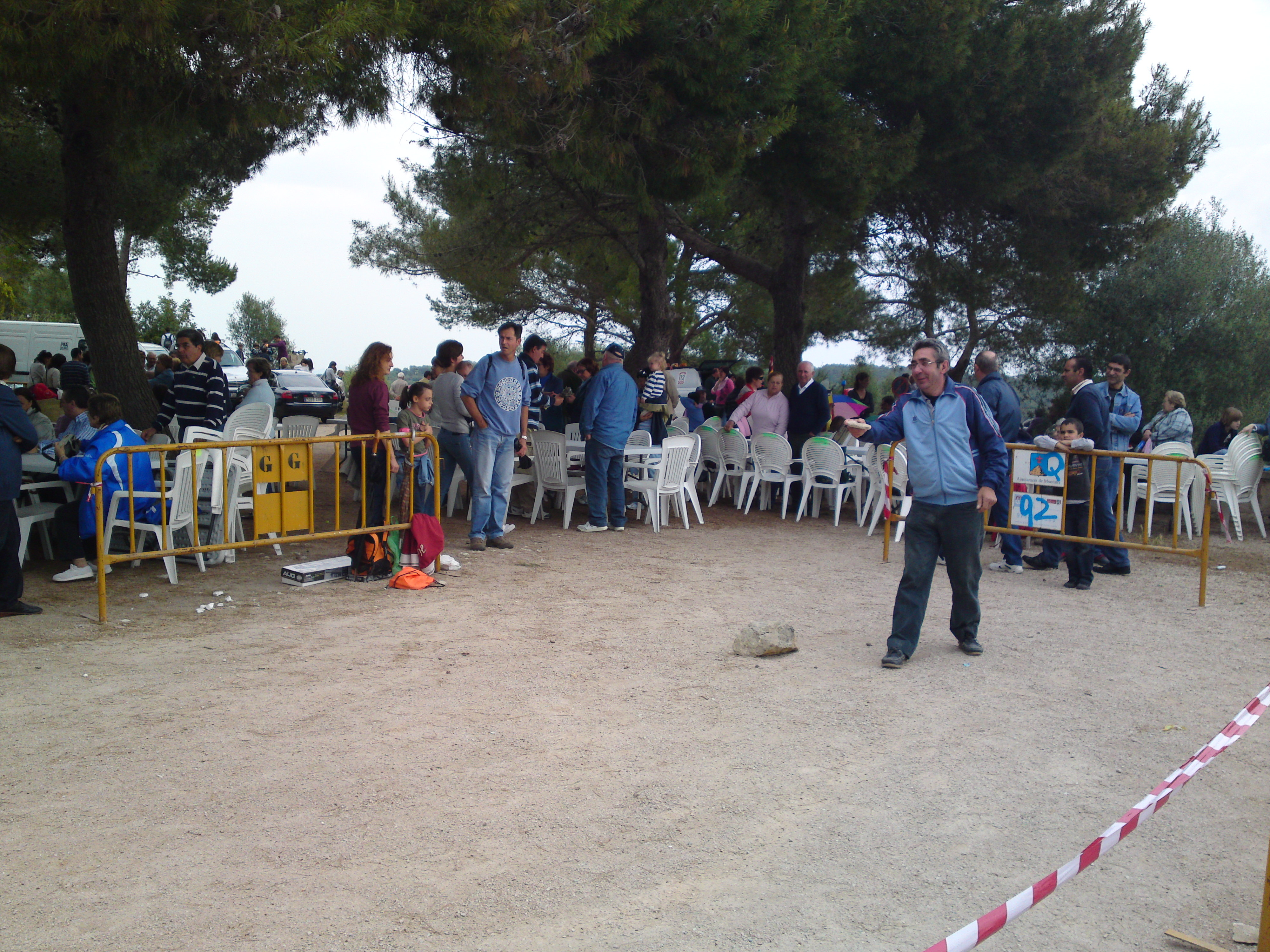 Campionat del joc de tella celebrat durant el pancaritat del Puig de Sant Miquel (Montuïri, Mallorca)